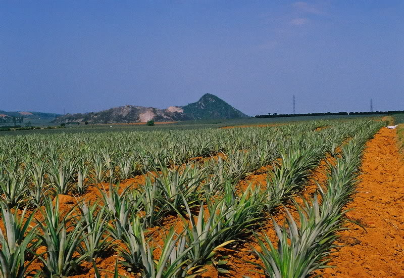 Nông trường dứa Đồng Giao - Công ty thực phẩm xuất khẩu Đồng Giao - thành phố Tam Điệp - Ninh Bình